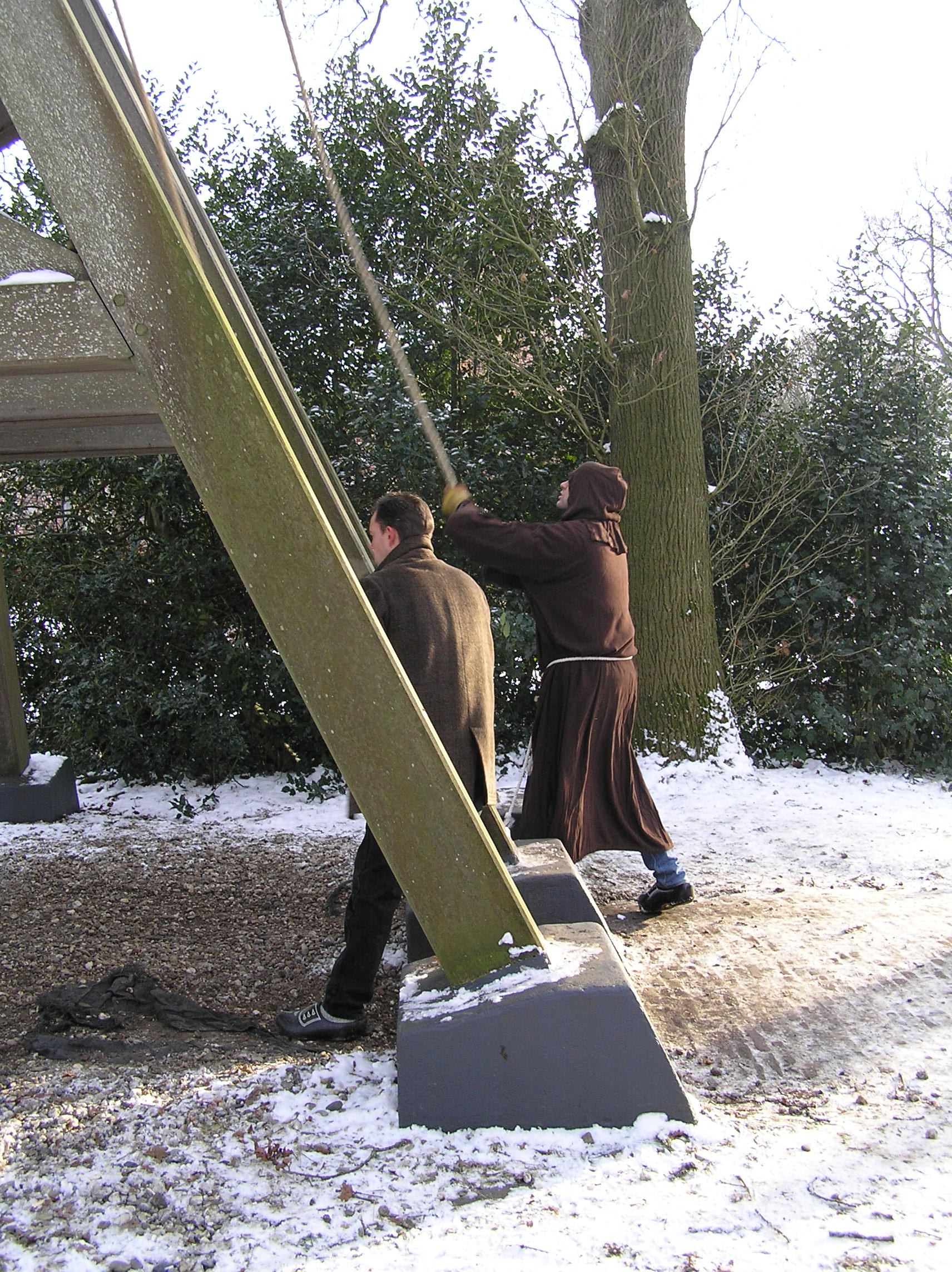 Sint-Thomaslieden yn Ketlik